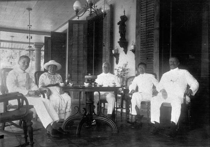 Foto. Groepje mensen in het huis van de heer Oei Dji San, Tangerang, West-Java.